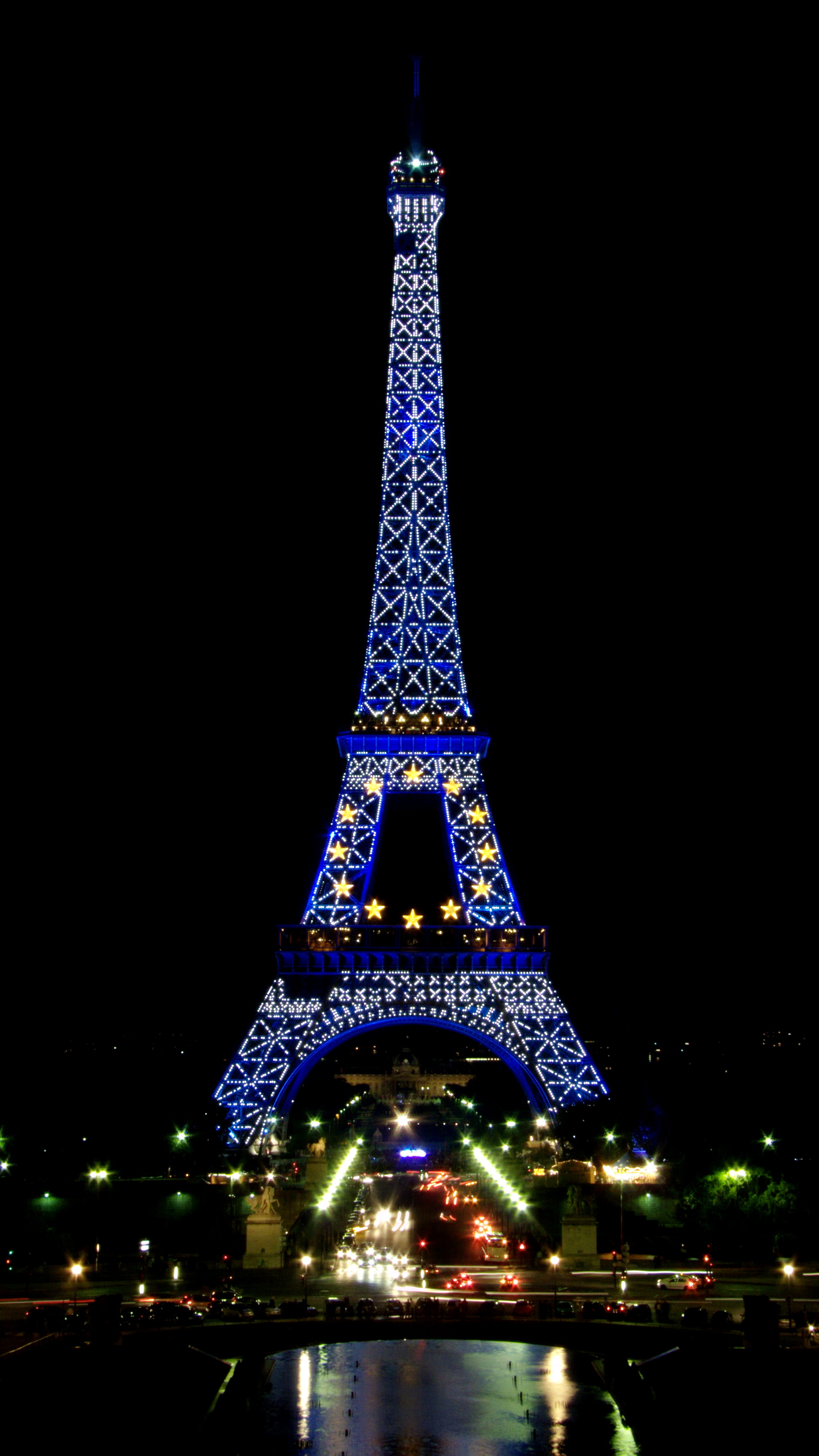 last days - derniers jours